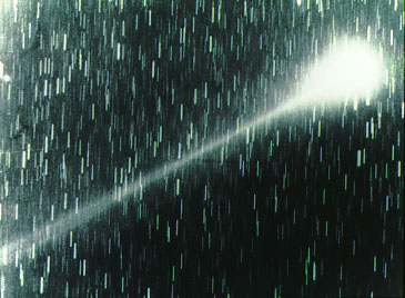 Comet 21P/Giacobini-Zinner